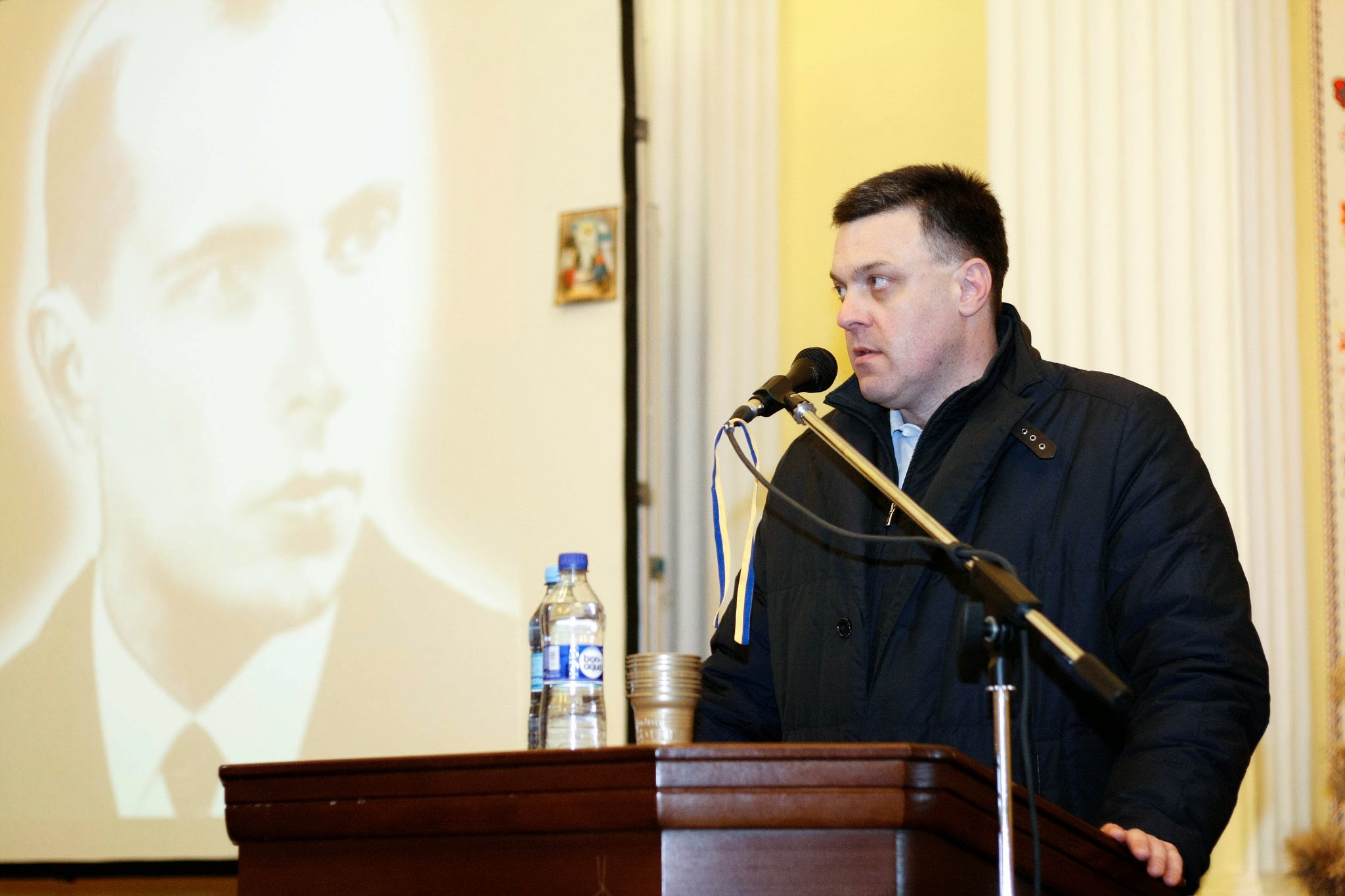 Бандеровские чтения в здании Киевской городской государственной администрации